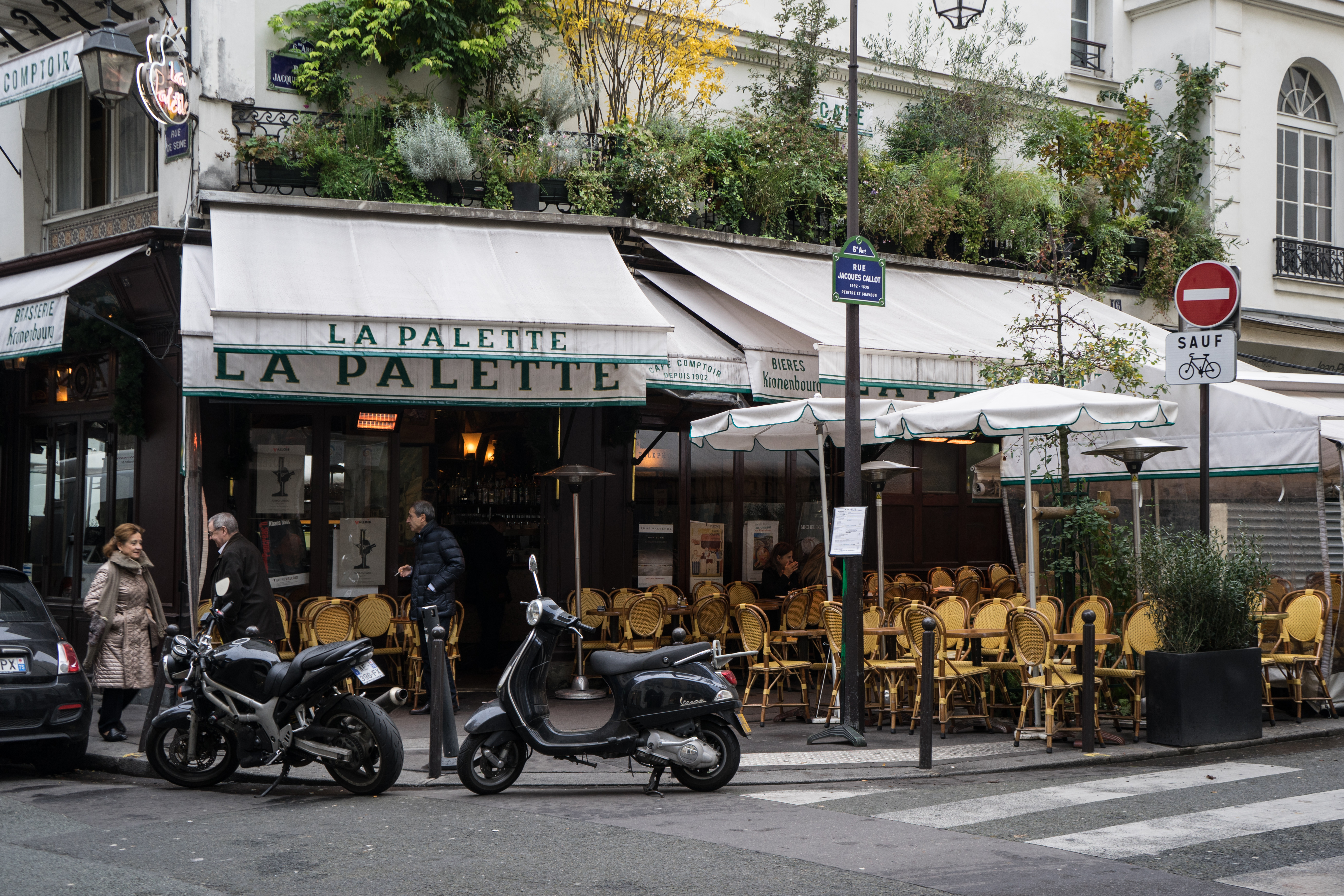 Café La Palette .